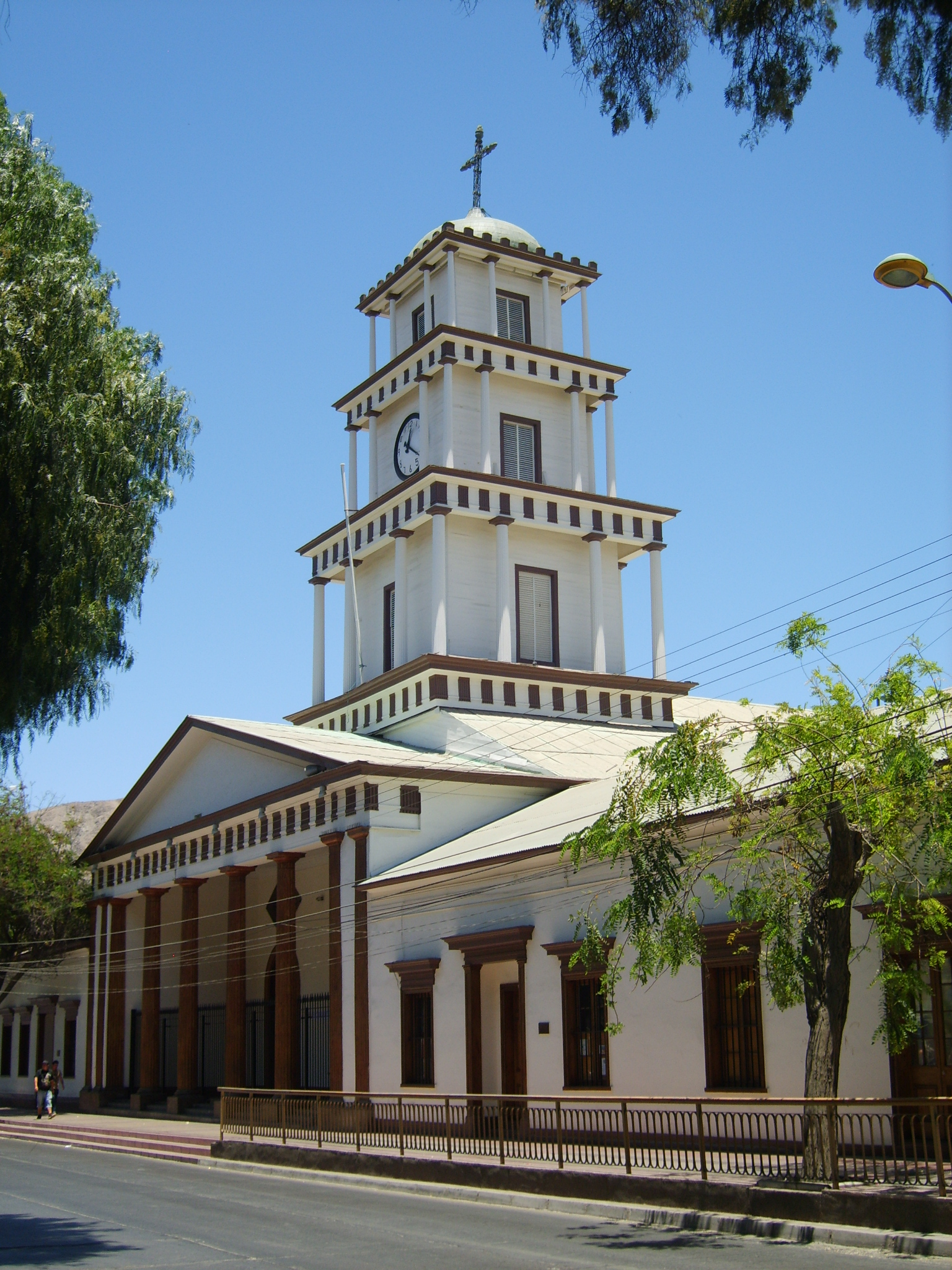 Catedral de Copiapó